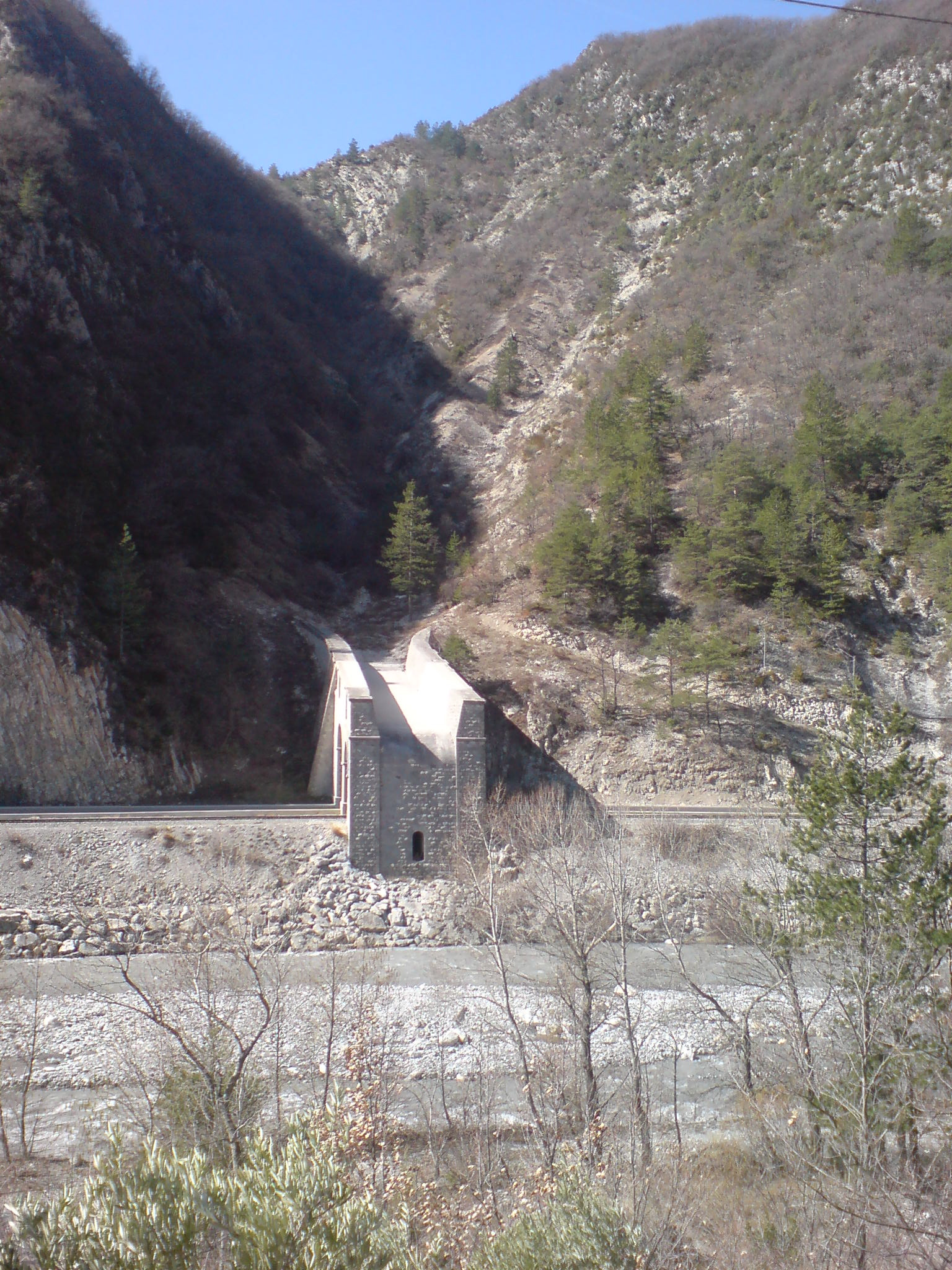 Ouvrage oriental de l’ensemble dit « Ouvrages des Éléphants » (à cause de la massivité de la construction originelle). On voit le vallon alimentant le pont-bâche. Il passe au-dessus de la route nationale 202 (France) et de la ligne Nice—Digne des chemins de fer de Provence, et se situe sur la commune d’Entrevaux. Photo prise de la rive gauche du Var.